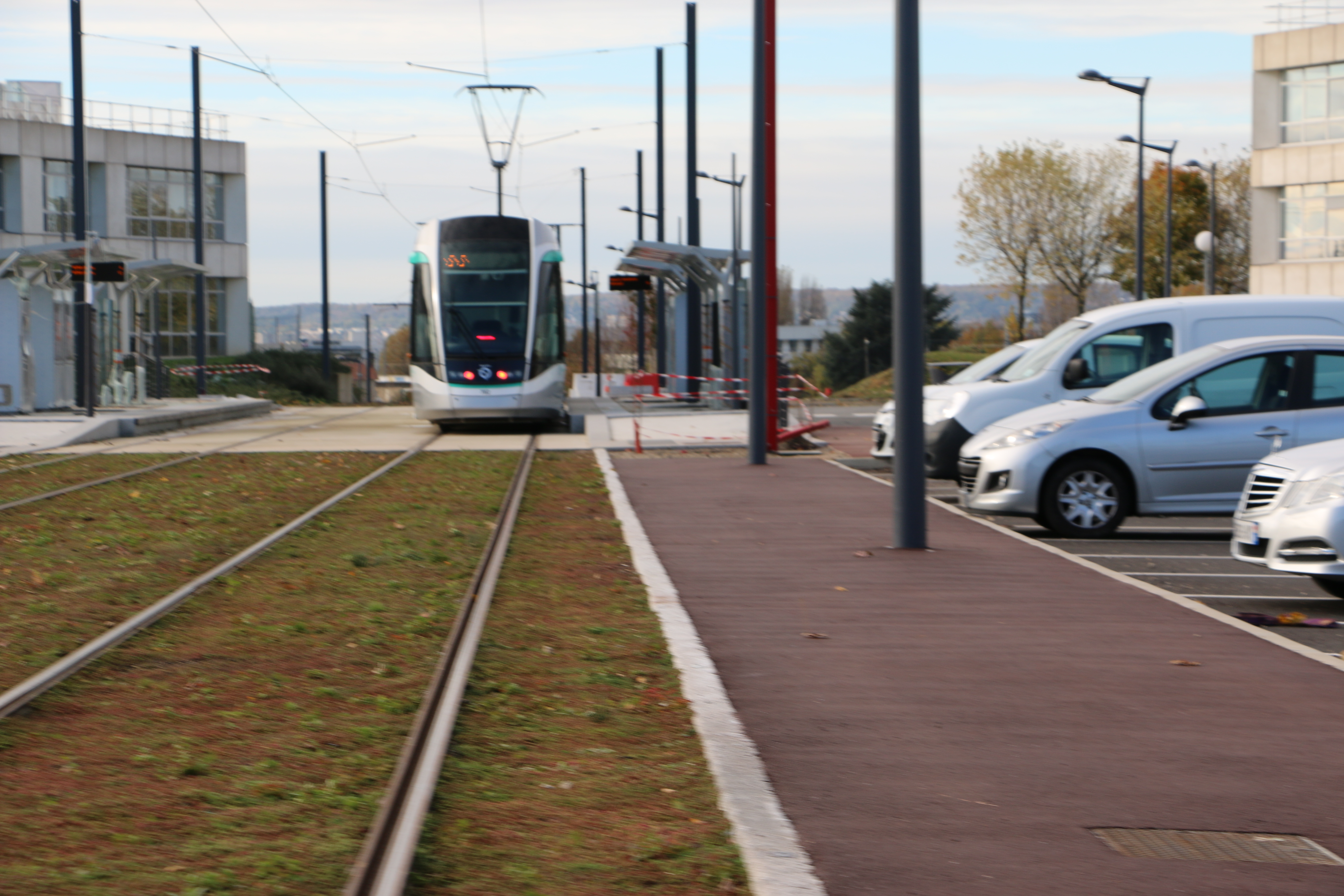 Tramway T7 - station Orlytech